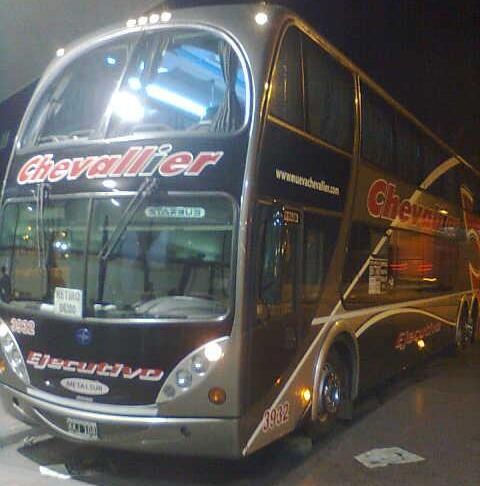 Mercedes-Benz con carrocería Metalsur Starbus de la Nueva Chevallier cubriendo el recorrido Rosario-Retiro.